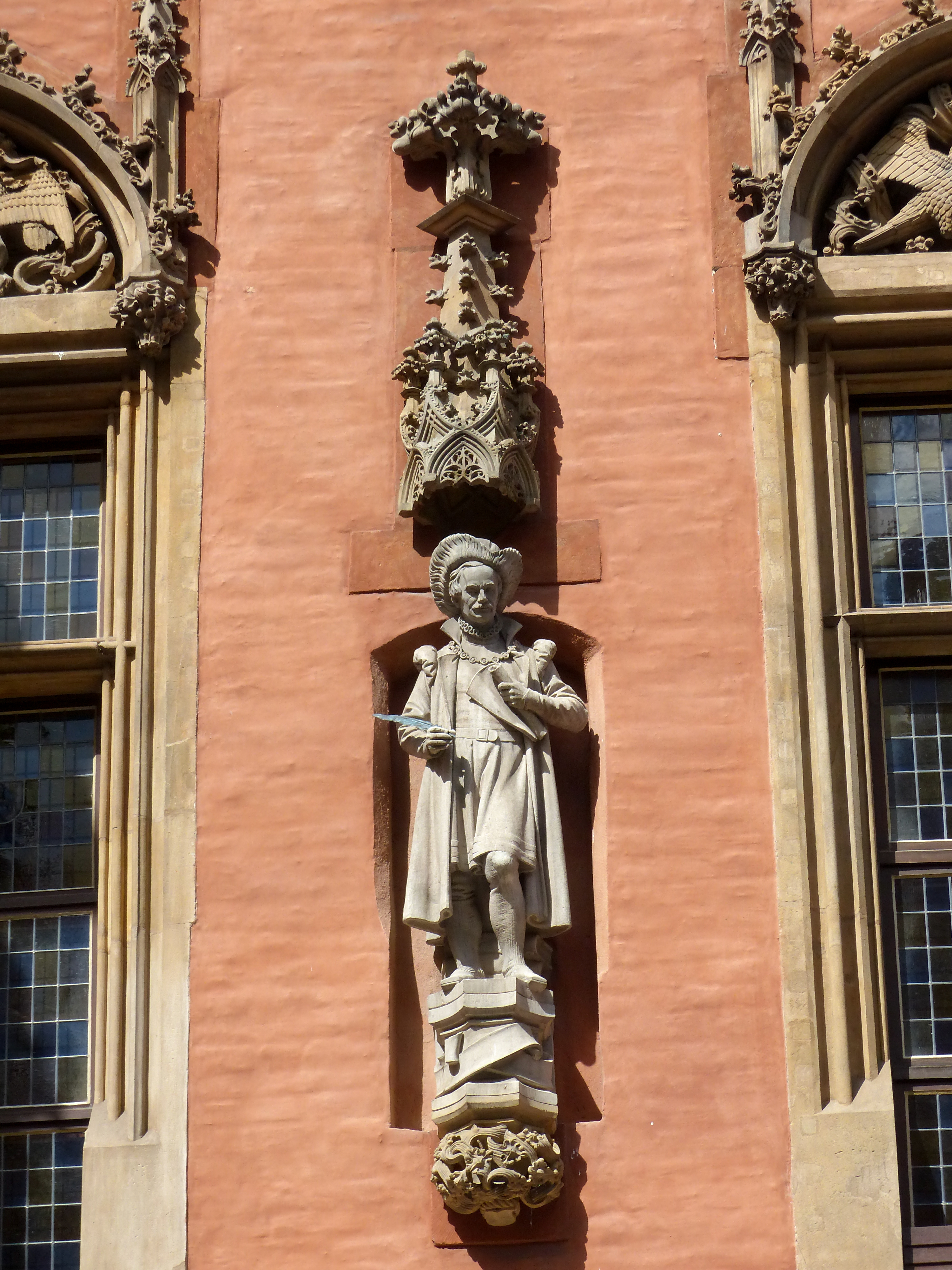 Gustav Dickhuth von Bildhauer Oskar Rassau am Rathaus Breslau, 1892